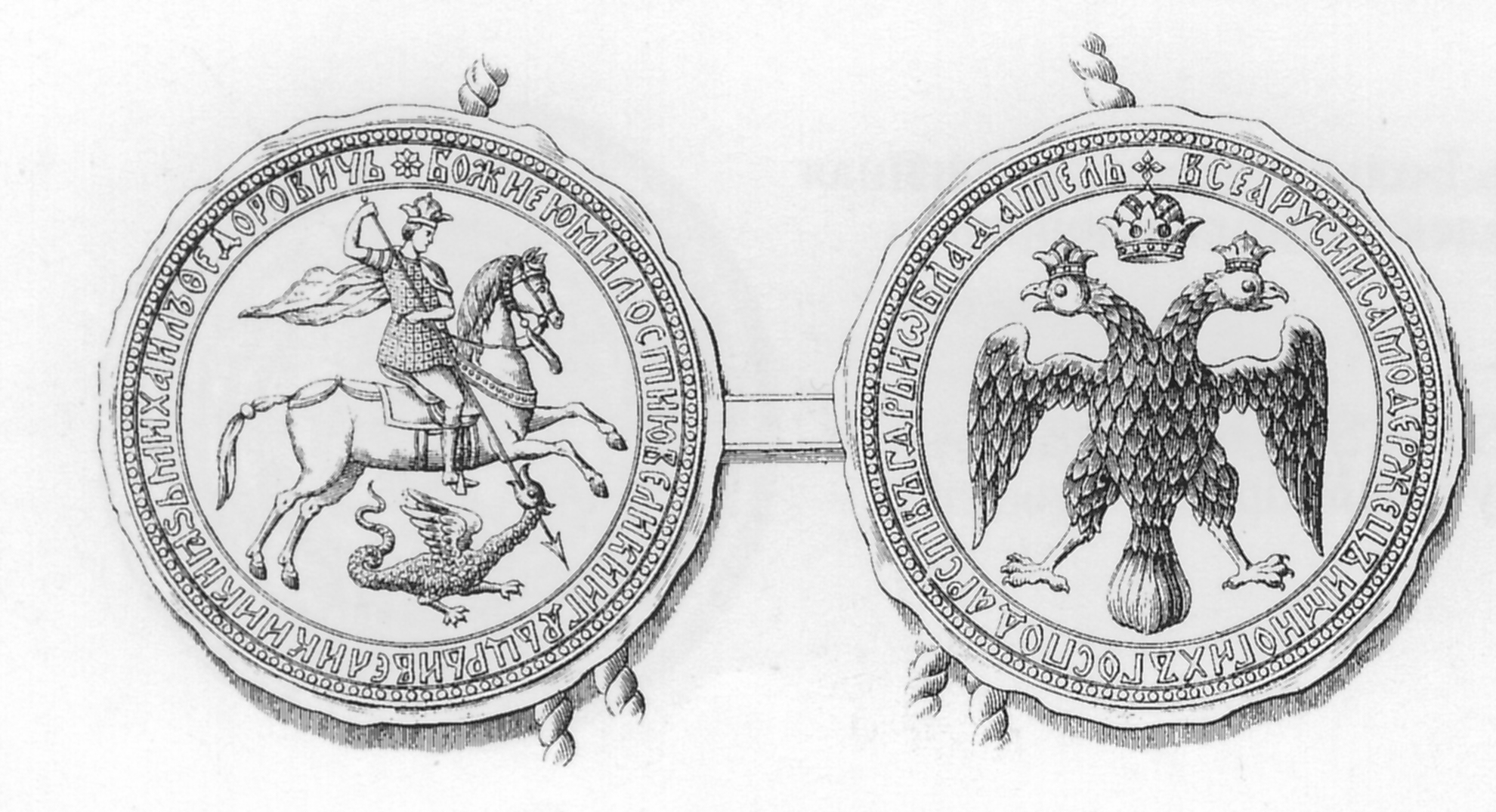 Прорисовка «двойной кормчей» (Орловской воротной) печати царя Михаила Фёдоровича, 1627 г. Прорисовка из издания Ф.А. Бюлера. (Источник — Вилинбахов Г.В. Государственный герб России. 500 лет. — СПб.: АО «Славия», 1997. - с. 33).